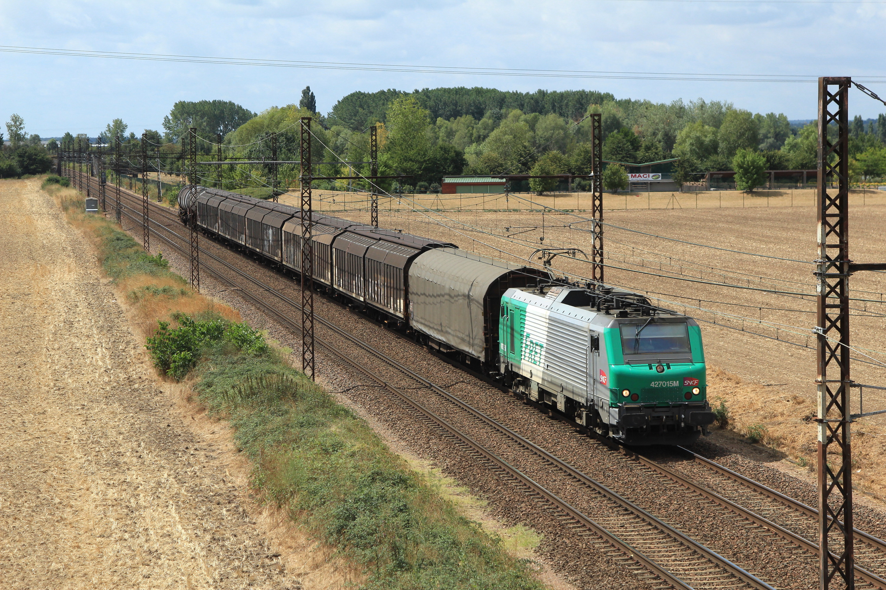 La BB 27015 en livrée Fret SNCF en tête du train de fret n° 56730 Hendaye - Woippy est vue sur la commune d'Ingrandes-sur-Vienne.